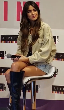 Asistimos al lanzamiento de la nueva línea de #Index y #Tini en Ripley del Jockey Plaza.